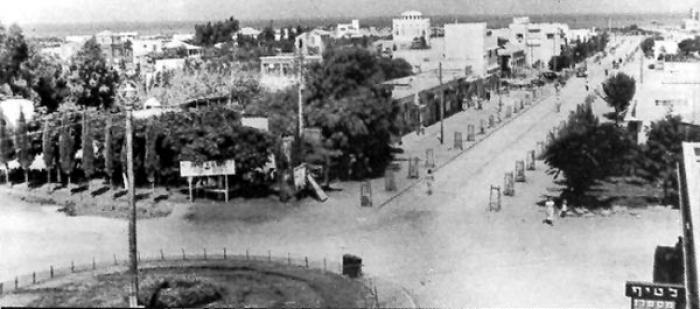 כיכר פוט והרברט סמואל בנתניה בשנות הארבעים. הרחוב הראשי, רח' הרצל, יורד לכיוון הים ומצטלב עם רחוב סמילנסקי